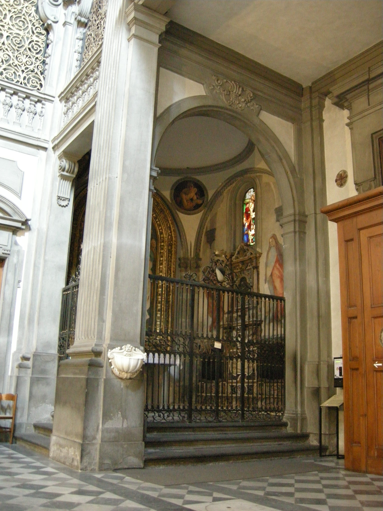 Cappella barbadori, architettura